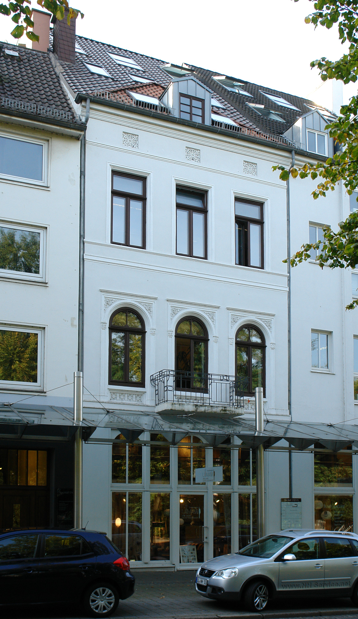 Wohnhaus in Bremen, Am Wall 173.Das abgebildete Objekt ist ein geschütztes Kulturdenkmal in der Freien Hansestadt Bremen, mit der Nr. 0081 beim Landesamt für Denkmalpflege registriert.